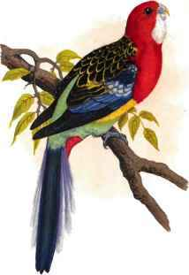 Rosellasittich (Platycercus eximius) aus Parrots in captivity